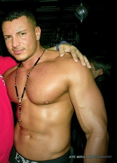 Angelo Marconi no The Drama Room em Dallas